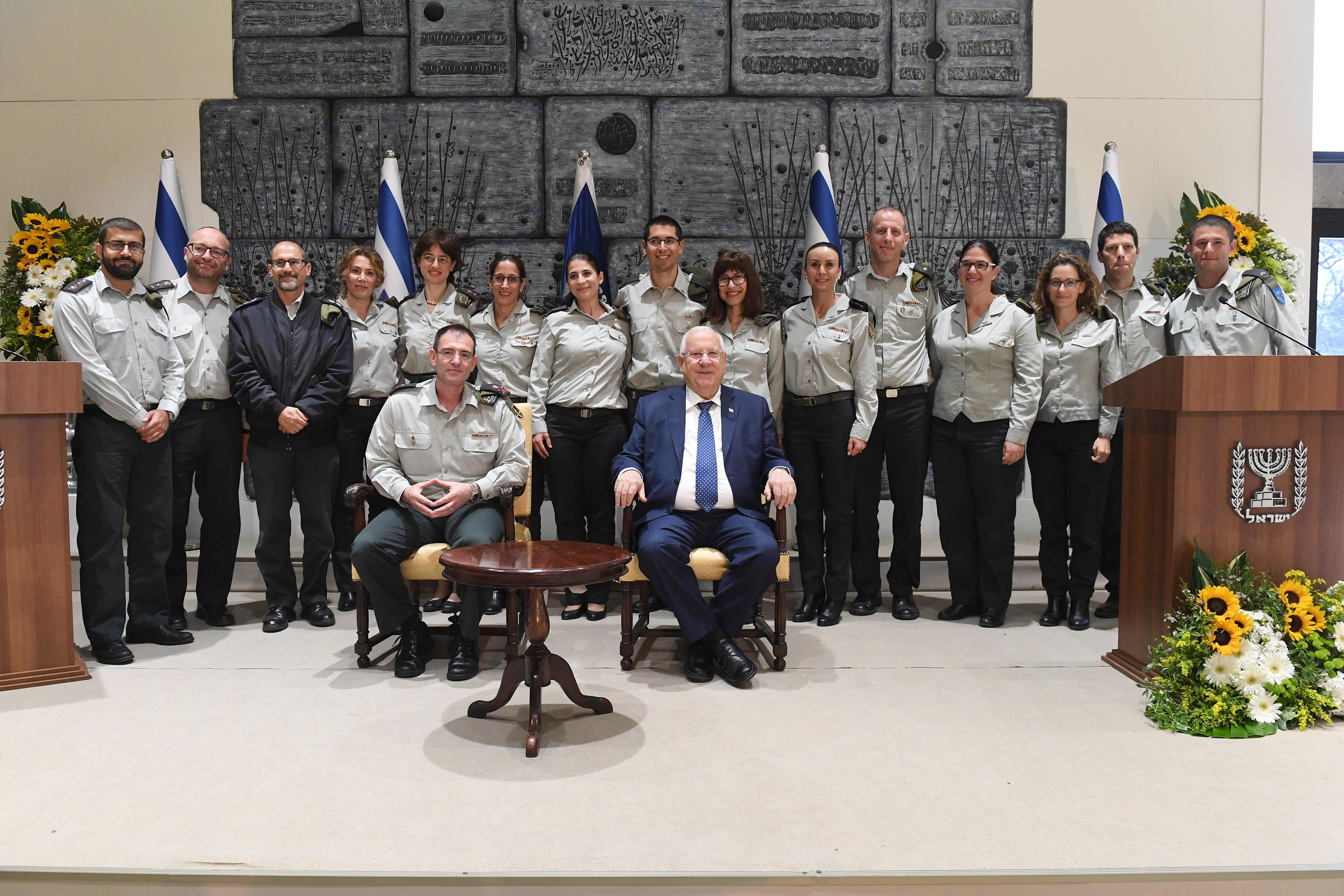 ראובן ריבלין נשיא מדינת ישראל בטקס השבעת שופטים צבאיים שנערך בבית הנשיא בתמונה ראובן ריבלין ושופטי בית הדין הצבאי